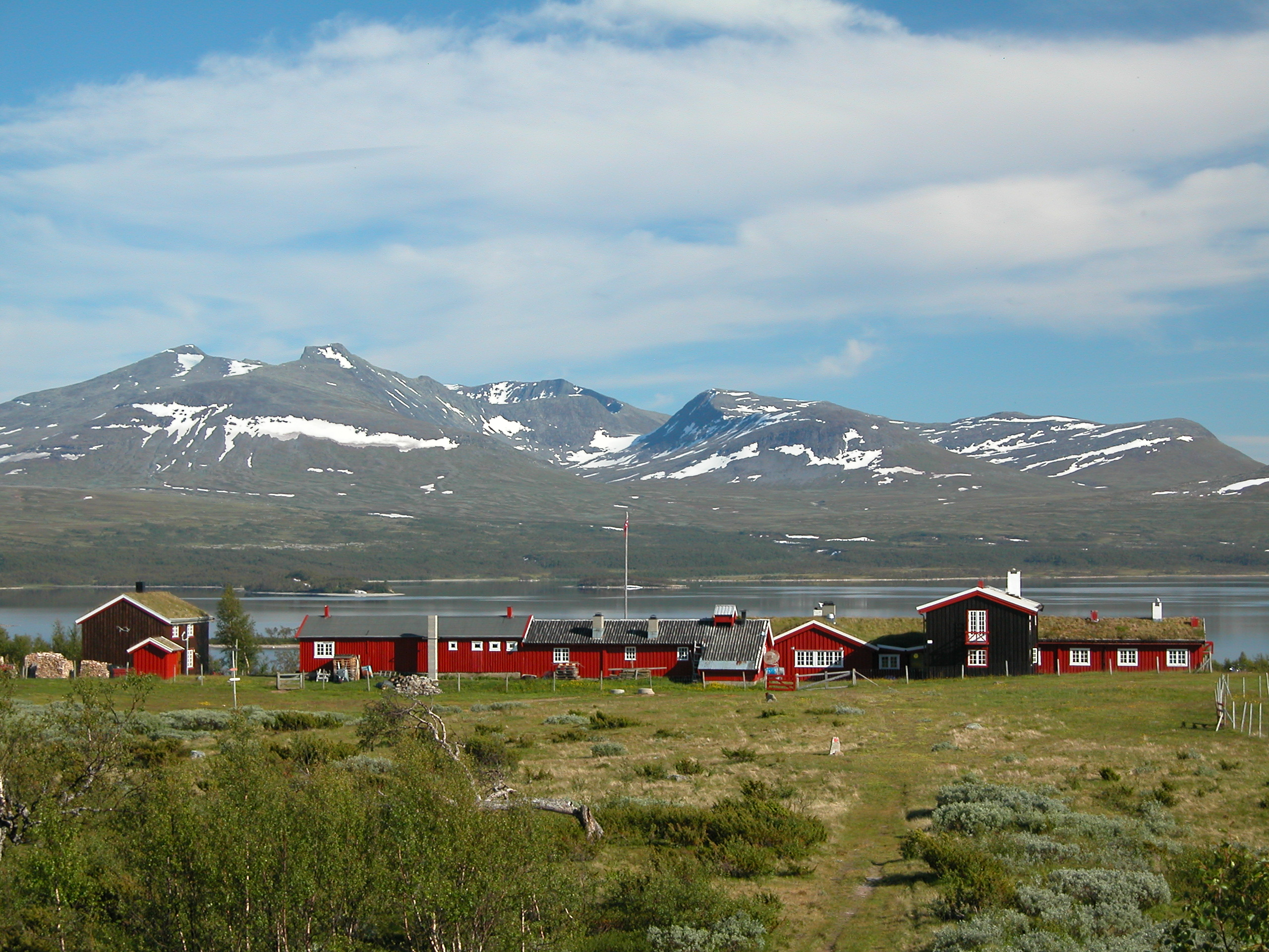 Storerikvollen i Sylan i Sør-Trøndelag